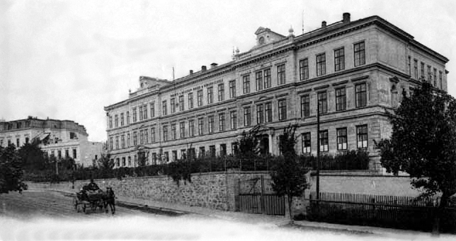 Budova Gymnázia v Kadani z počátku 20. století